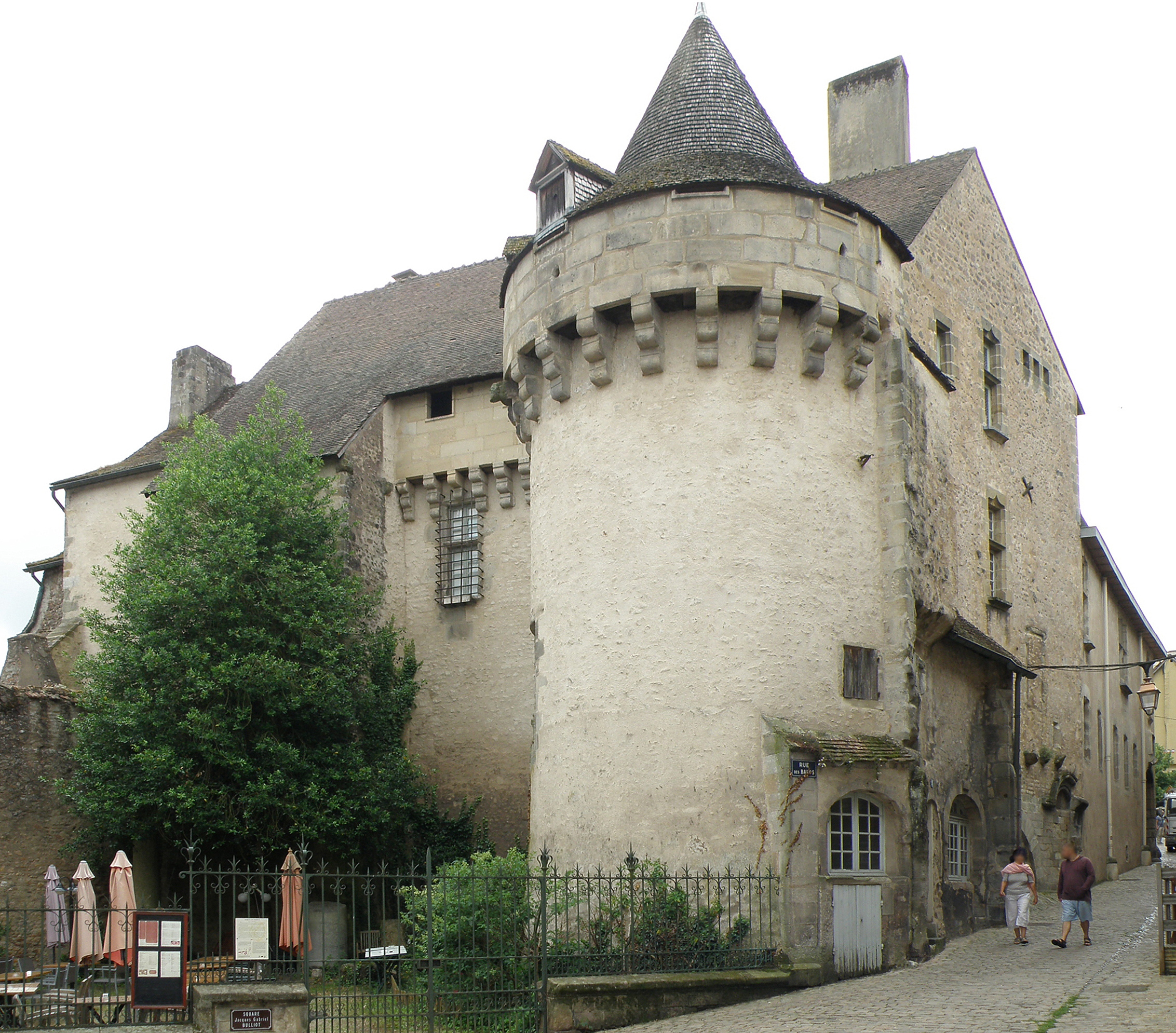 Autun (Saône-et-Loire, Bourgogne, France). Hôtel du Chancelier Rolin, rue des Bancs.